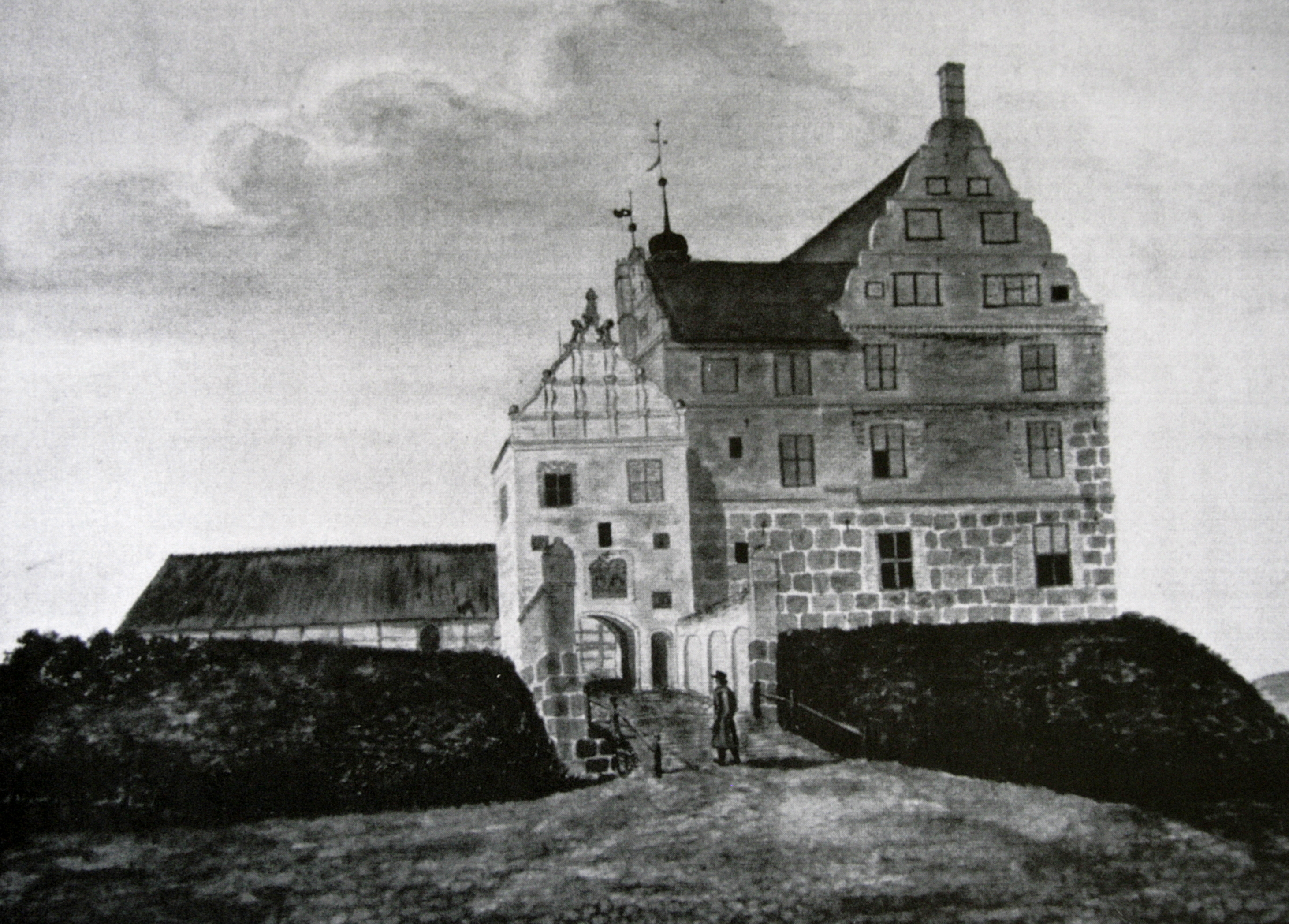 Schloss Ulrichshusen bei Schwinkendorf, Mecklenburg-Vorpommern, Deutschland, auf einer Gouache um 1730, Ansicht aus Osten